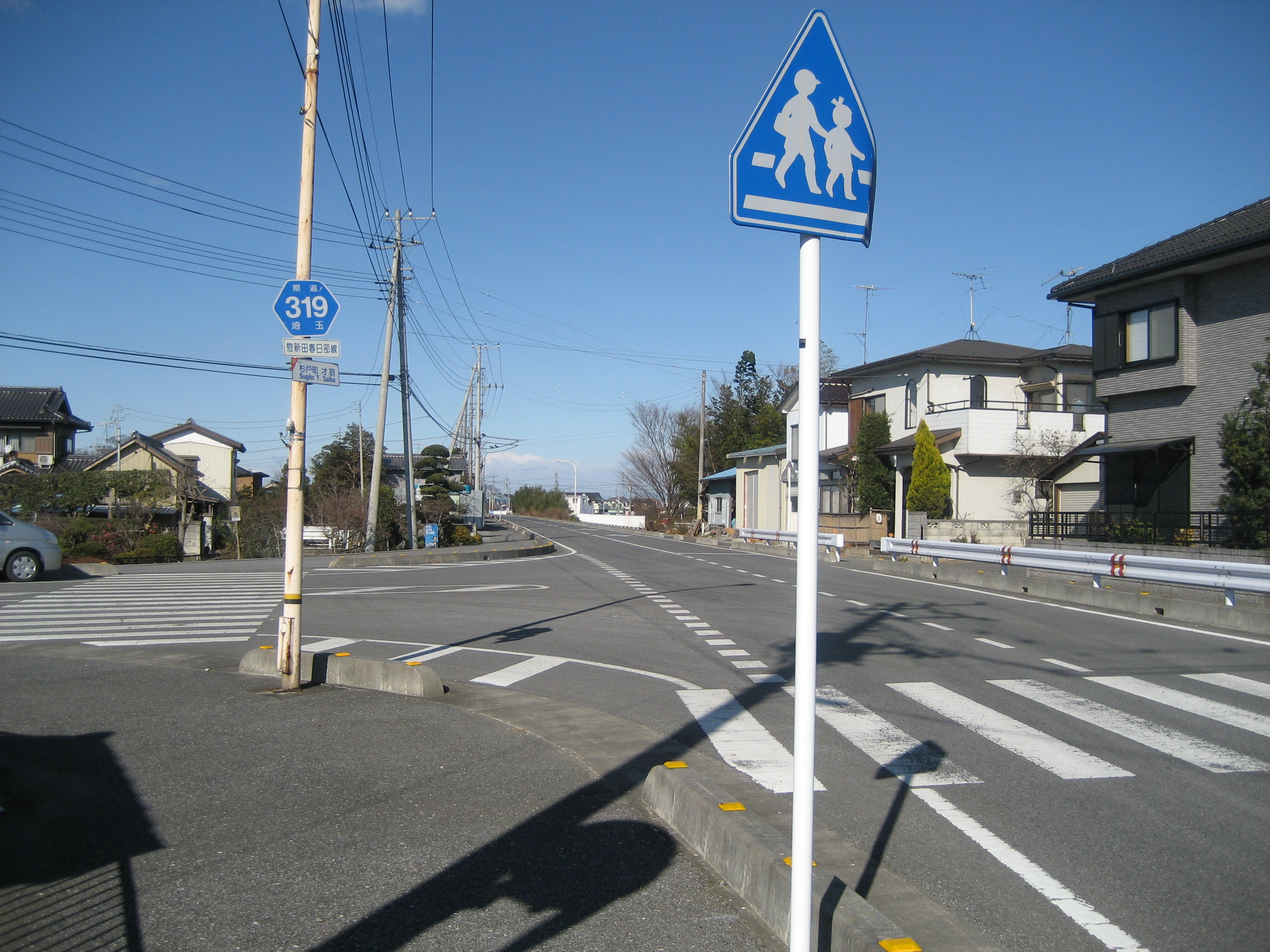 埼玉県道319号線杉戸町内